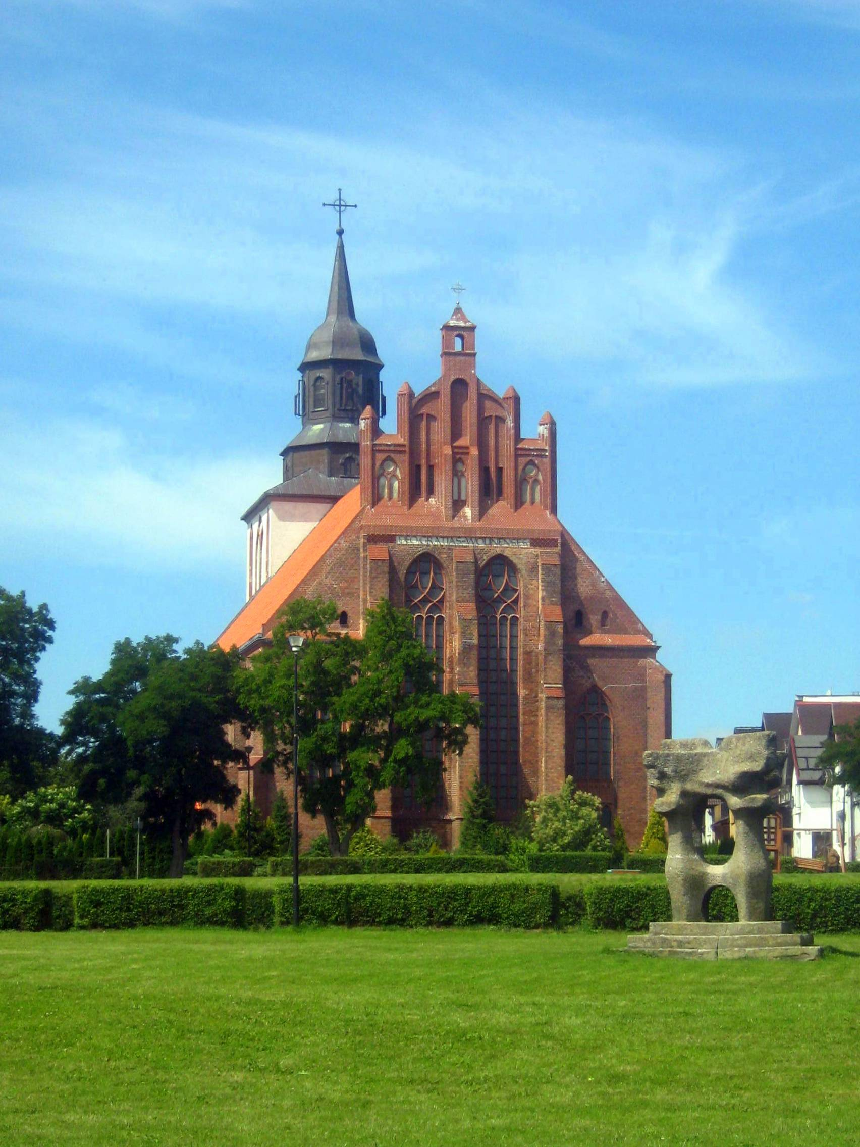 Kościół św. Mikołaja w Wolinie